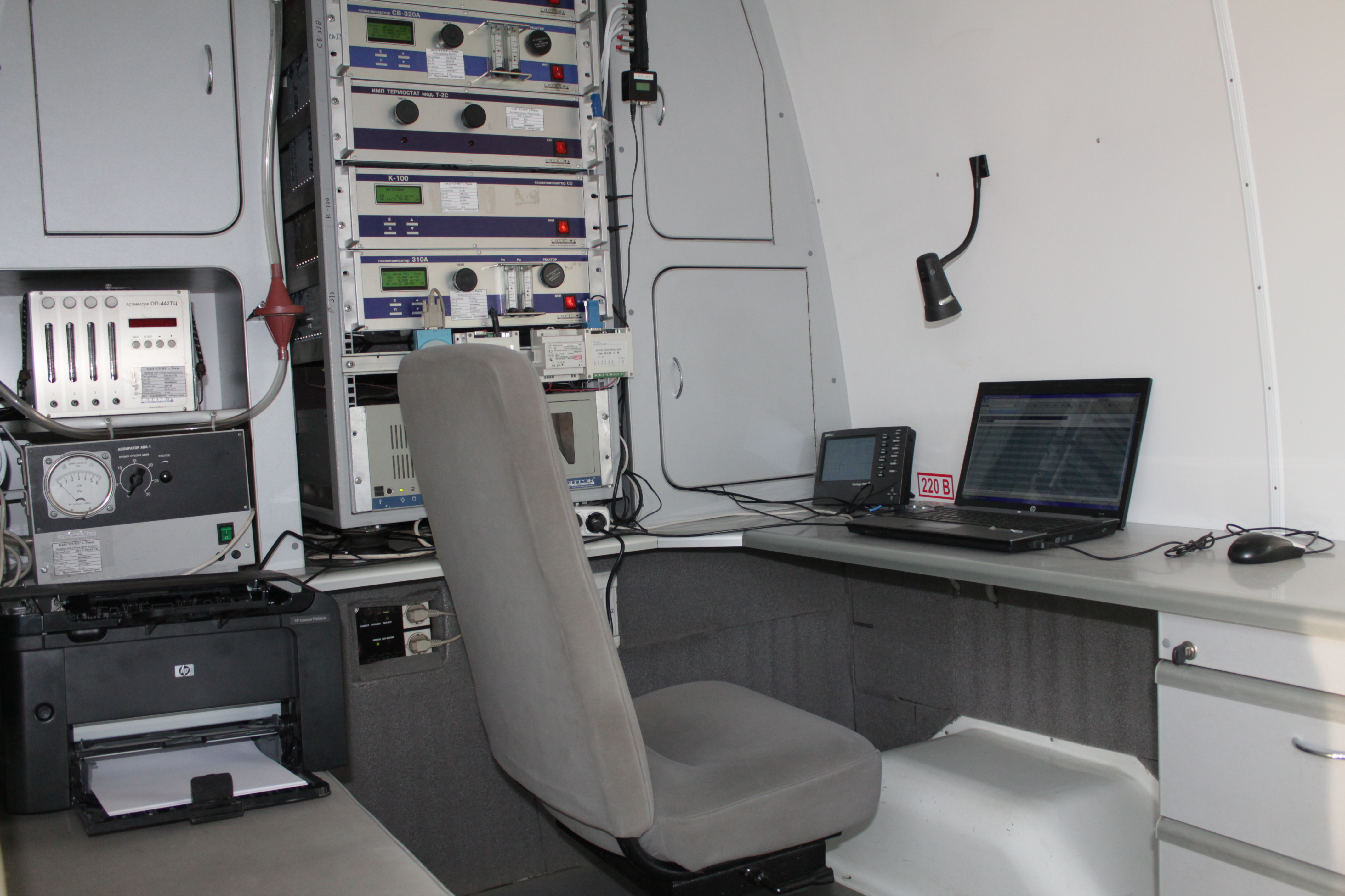 СУМЗ. Мобильная эколаборатория, внутри